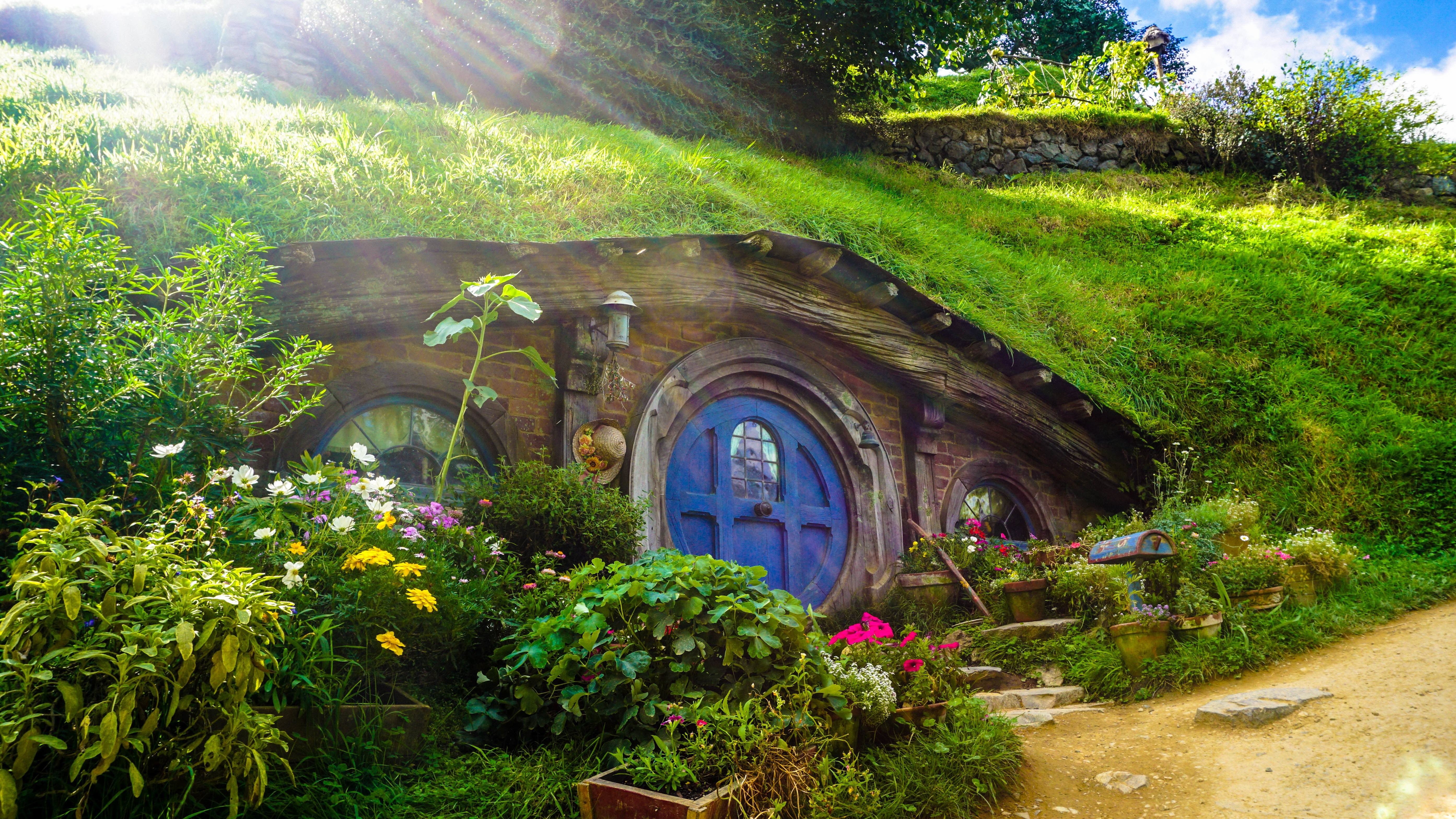 Local do Condado, da série Senhor dos Aneis.